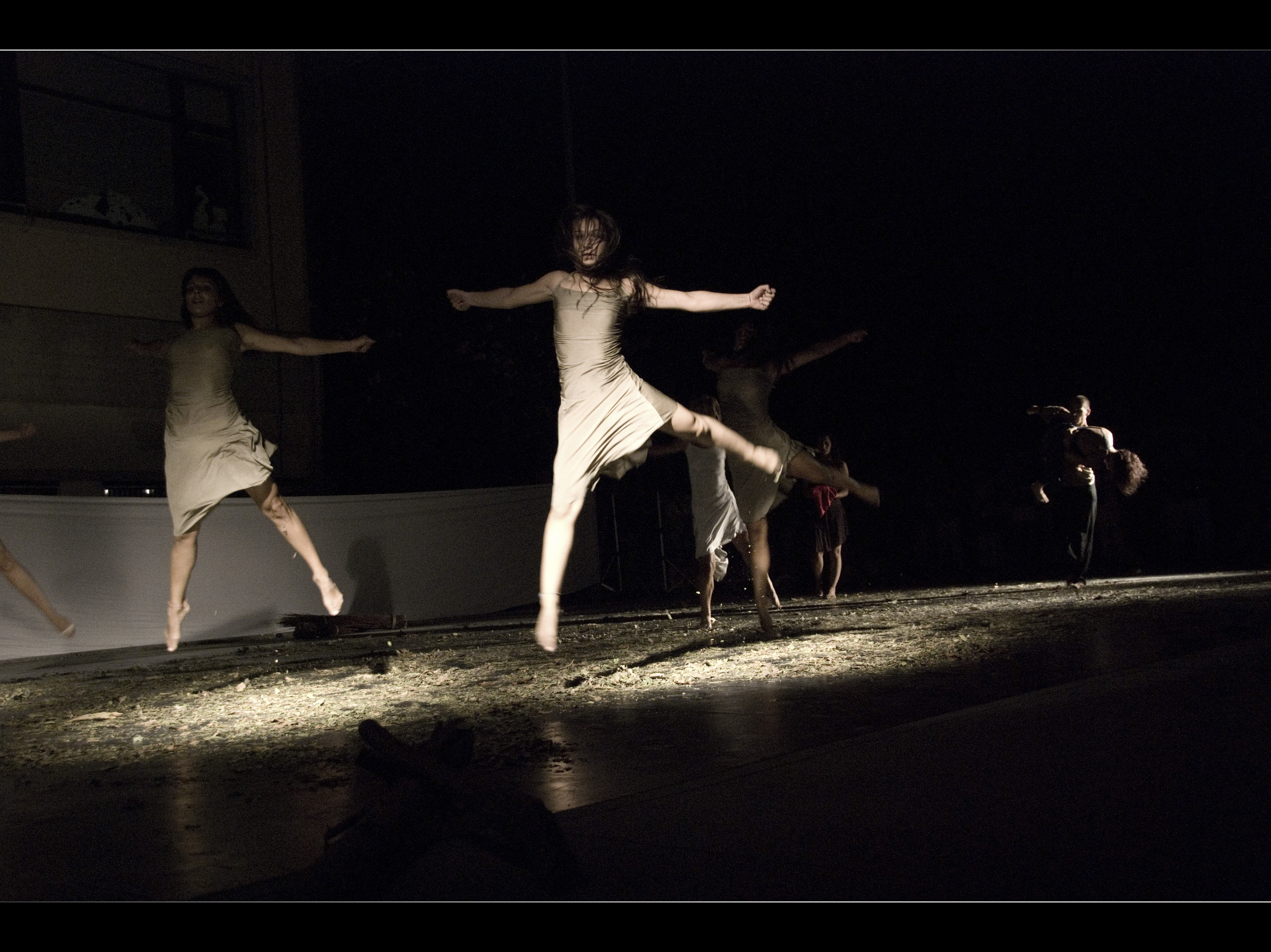 Le Sacre du printemps - Sirolo